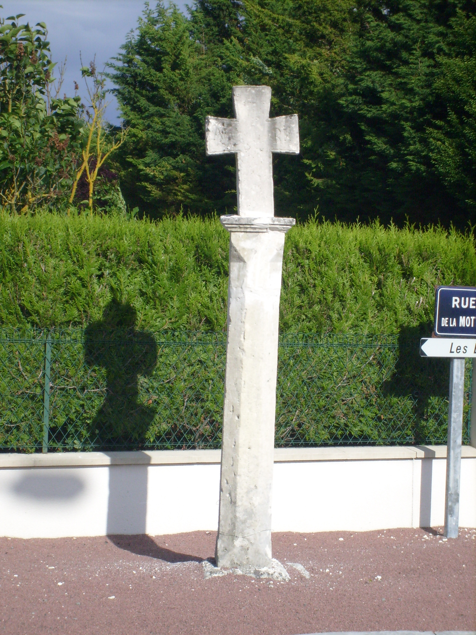 Le calvaire de la Croix-Vieille à Médis